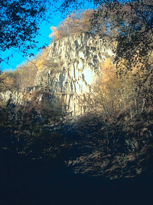 Steinbruch am Oelberg